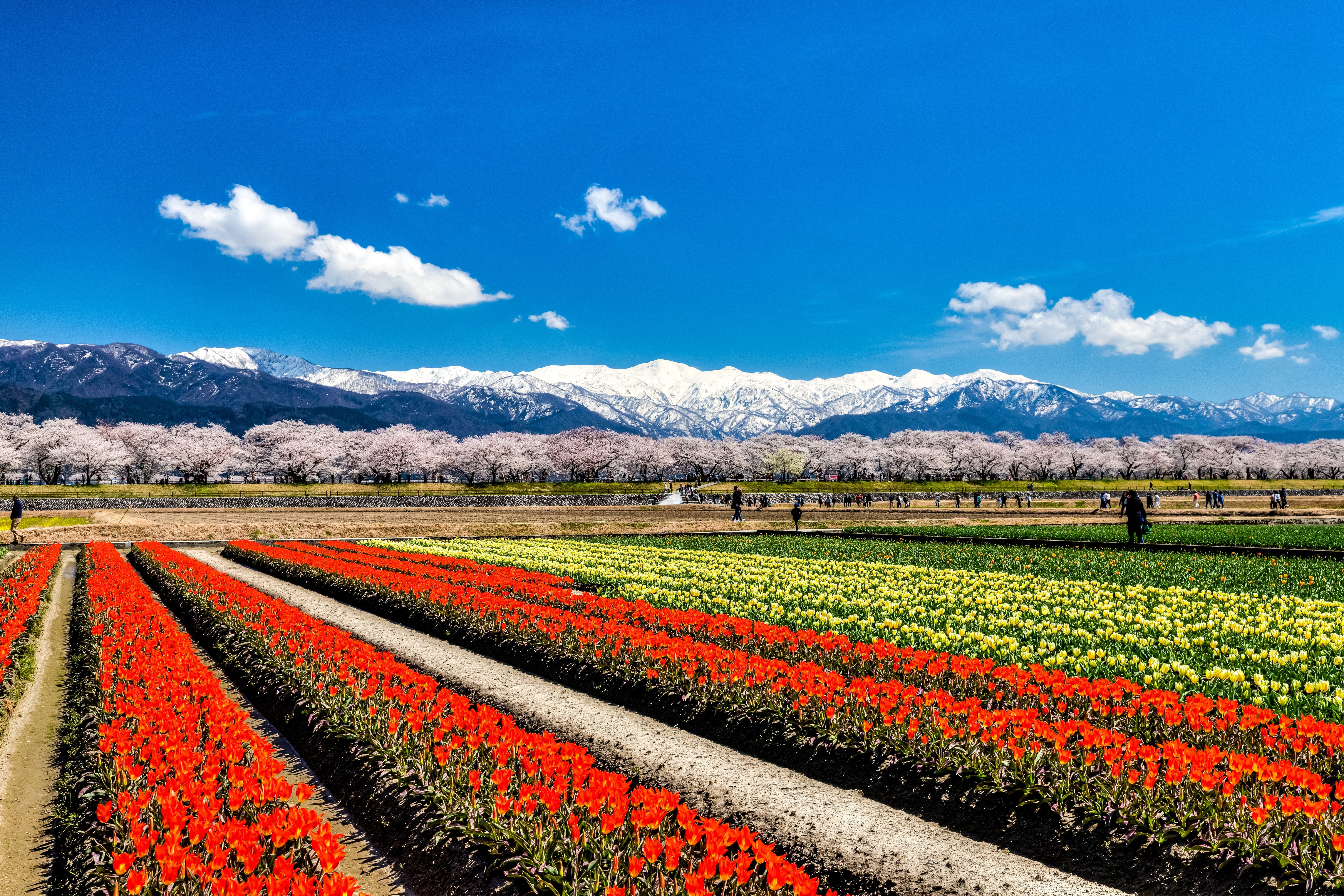 富山県下新川郡朝日町、舟川べり、チューリップ、桜、北アルプス、朝日岳